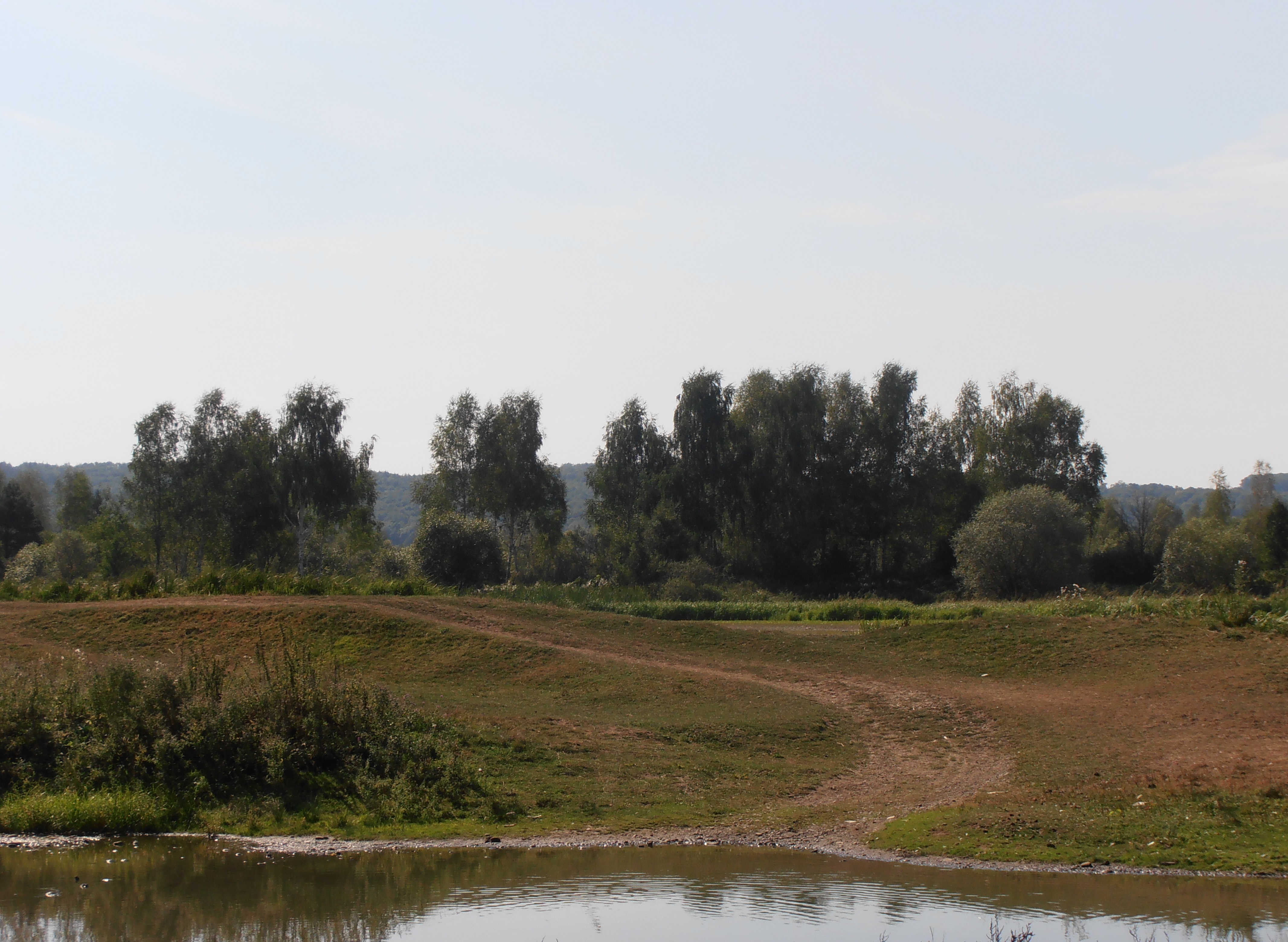 Фільварок